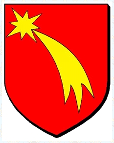 Blason des seigneurs d'Arguel (Doubs)